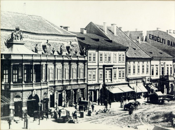 A kolozsvári Fő tér keleti oldala 1895-ben